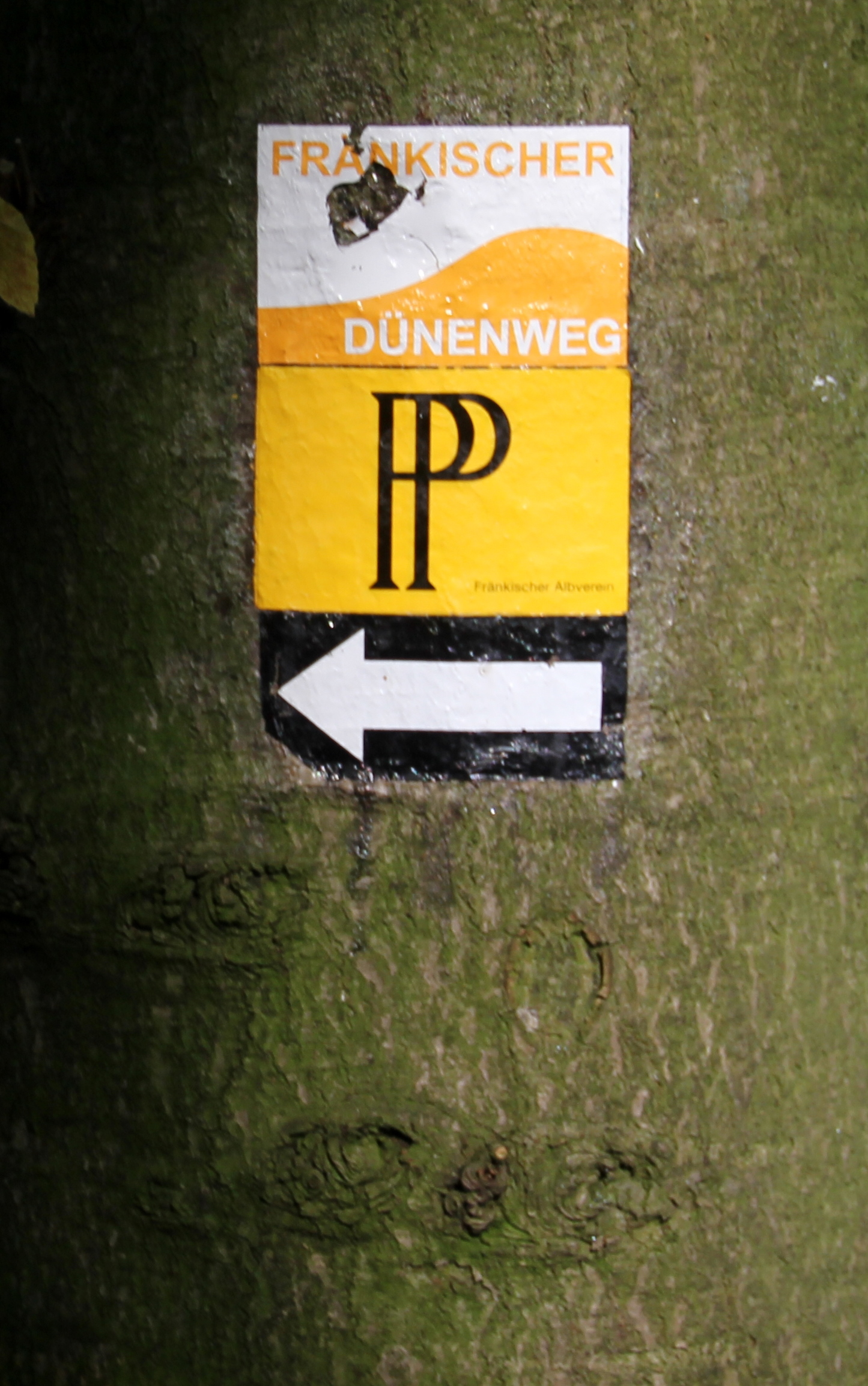 Wanderweglogo Paul-Pfinzig-Weg und Fränkischer Dünenweg